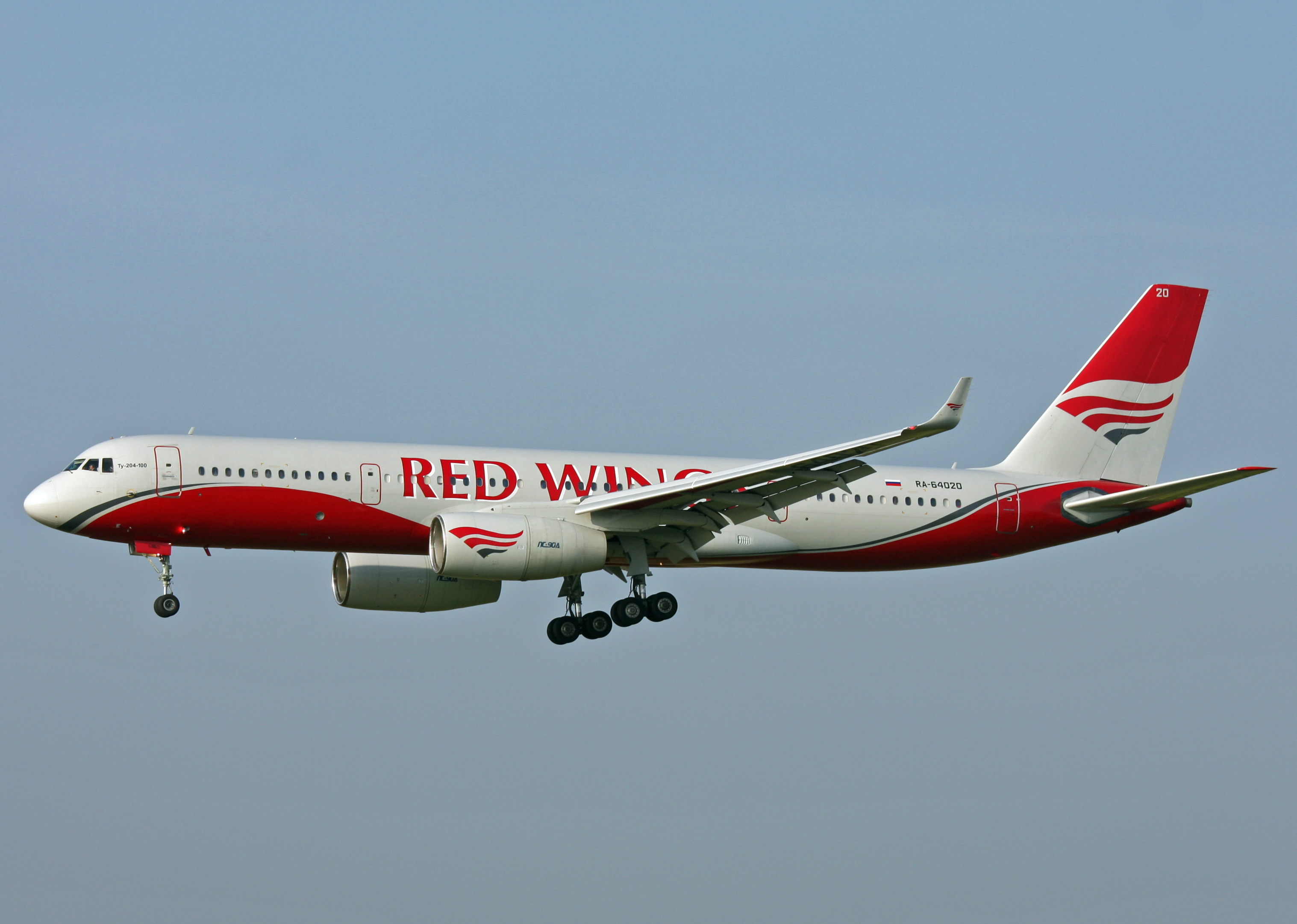 First Visit in Germany , inside Russian Football Fans FMO-Münster Osnabrück